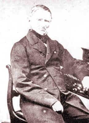 Фотопортрет главного почтмейстера Ольденбурга с 1851 по 1867 год Бёдекера